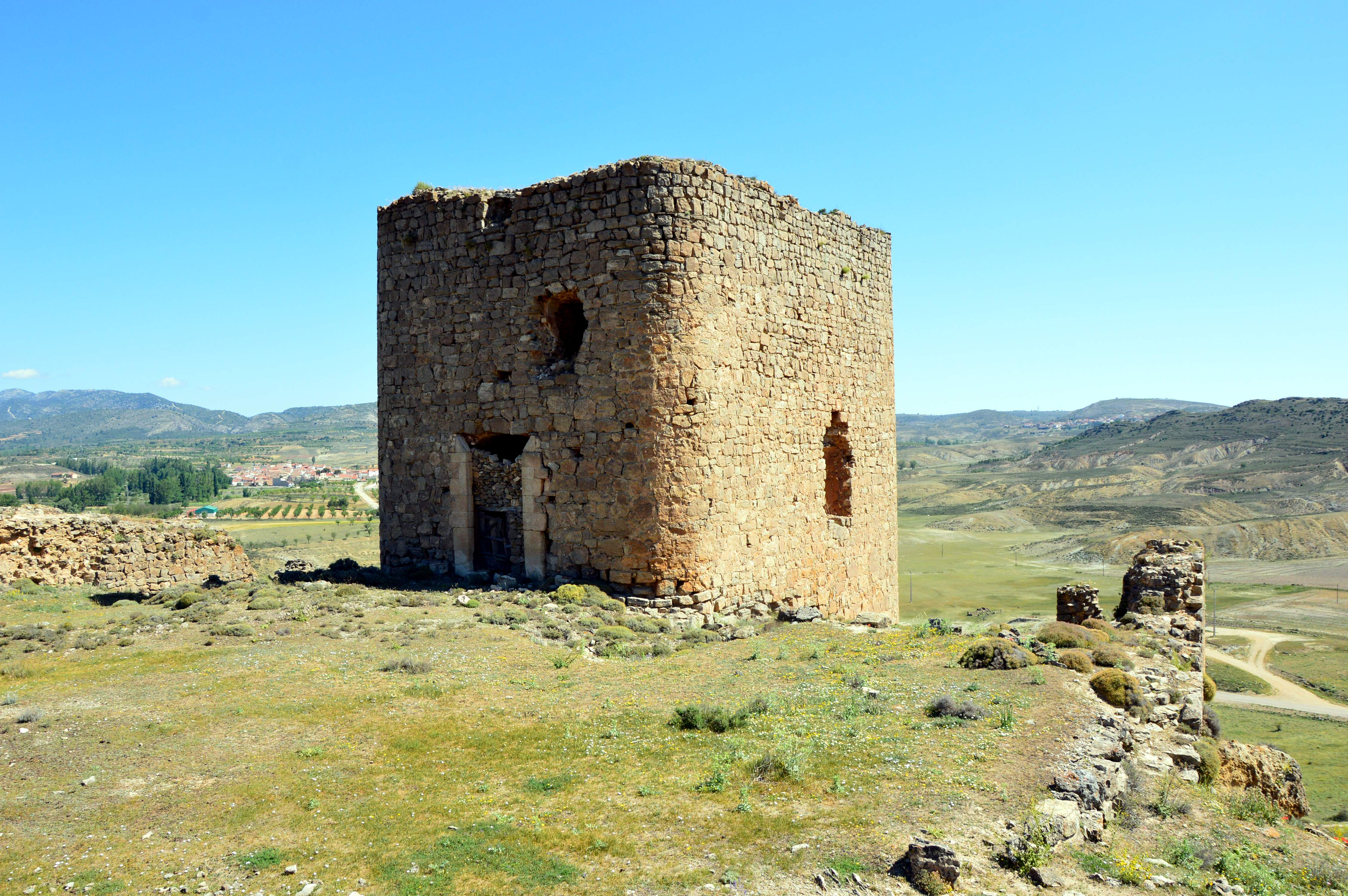 Vista parcial de La Coracha de Moya (Cuenca), con detalle de la Torre de San Roque, 2017.